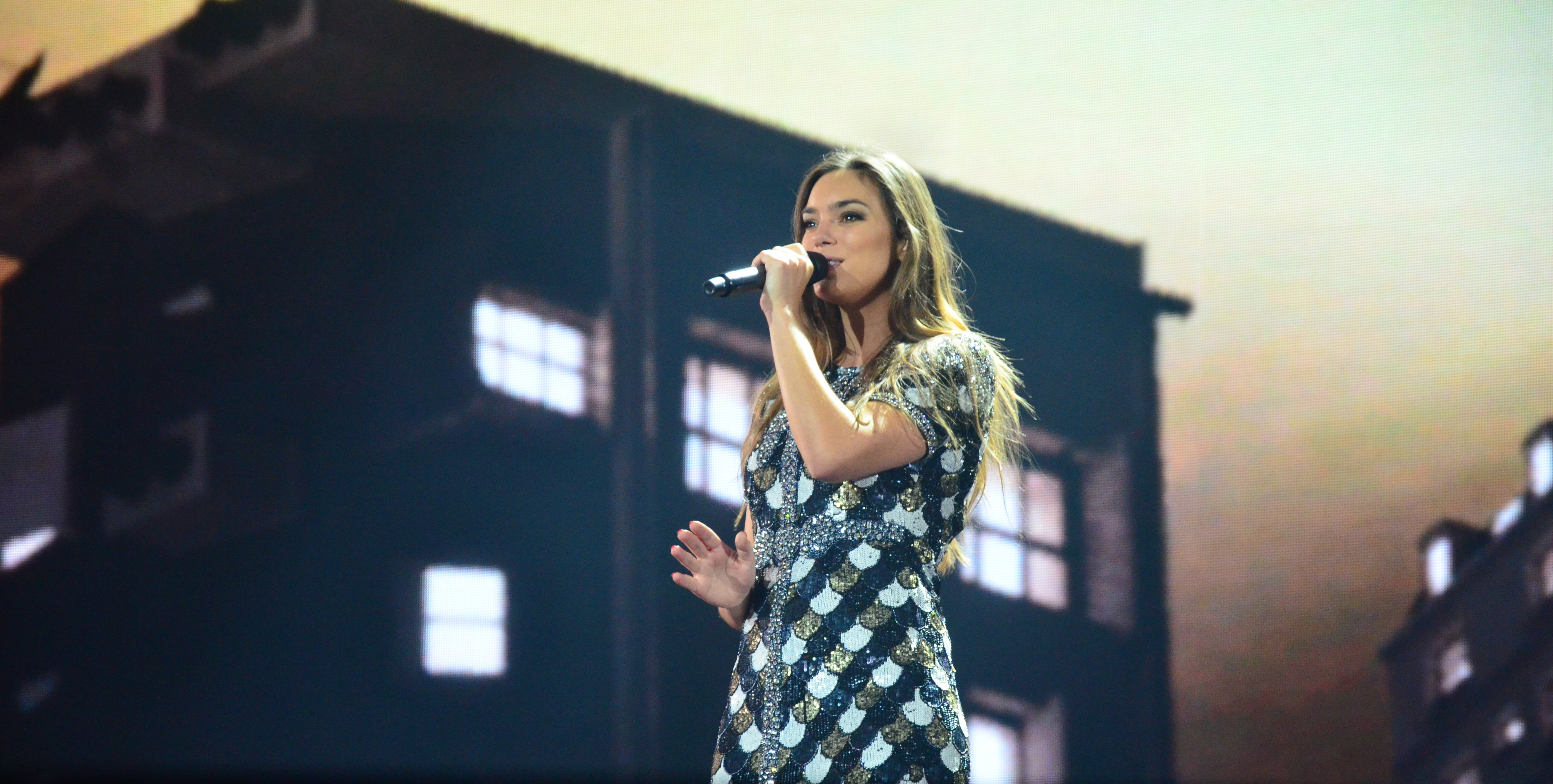 10 травня 2017 року у Києві відбулась генеральна репетиція 2 півфіналу "Євробачення".